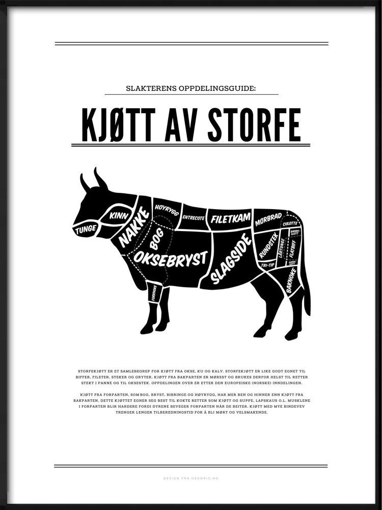 Den norske inndeling av Kjøtt av storfe. Bilde er laget Dekorio.no med inspirasjon fra Matprat.no sin nettressurs.